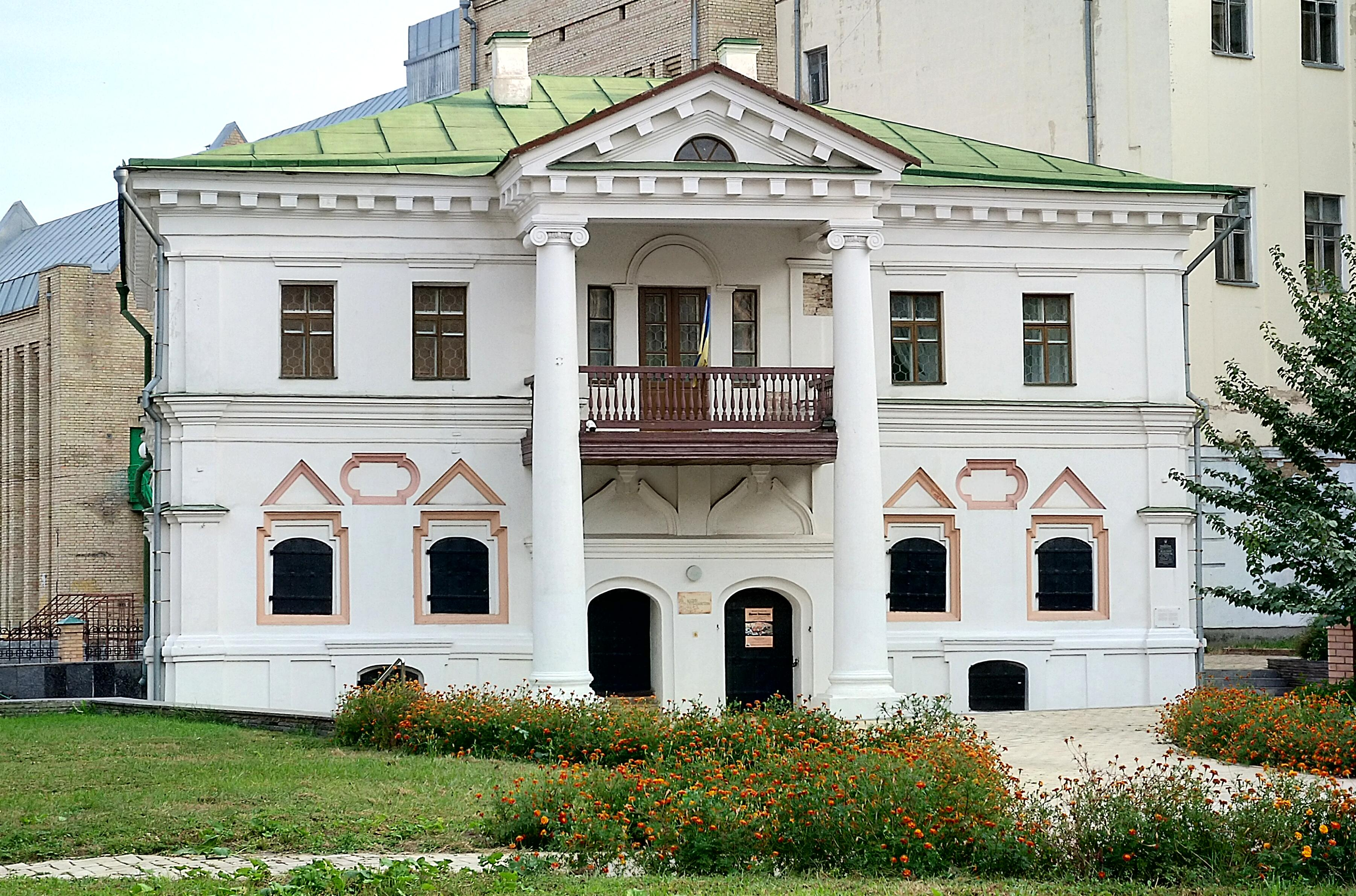 Будинок житловий (флігель) («Будинок Мазепи»), Київ, Спаська вул., 16-Б